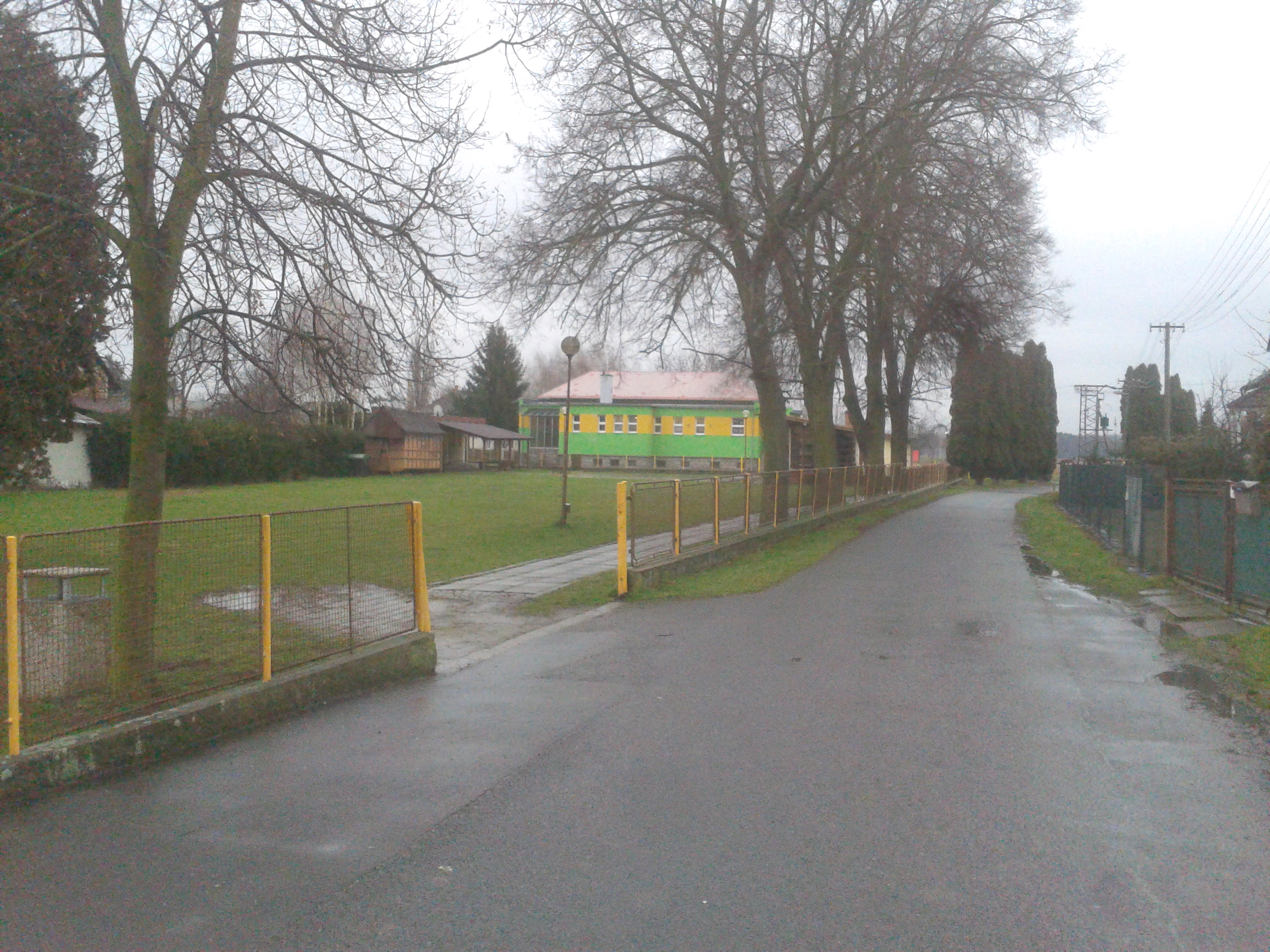 Bohuslavice školka